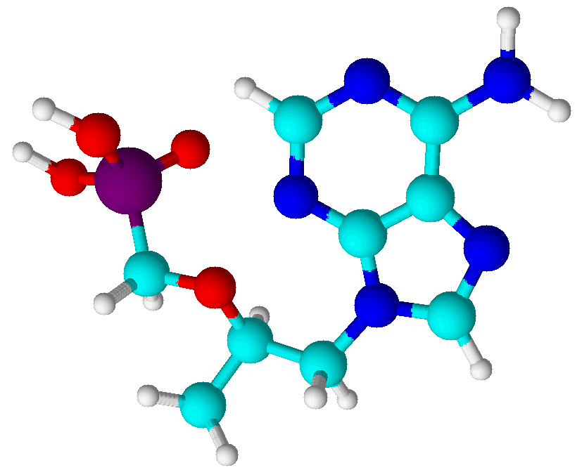 Molécule de tenofovir